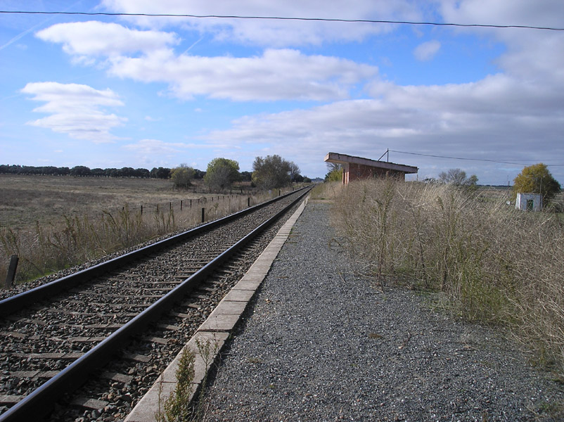 Vista de la línea férrea Salamanca - Fuentes de Oñoro desde el paso a nivel del p. k. 53,205